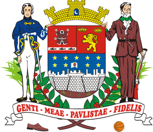 Brasão de armas